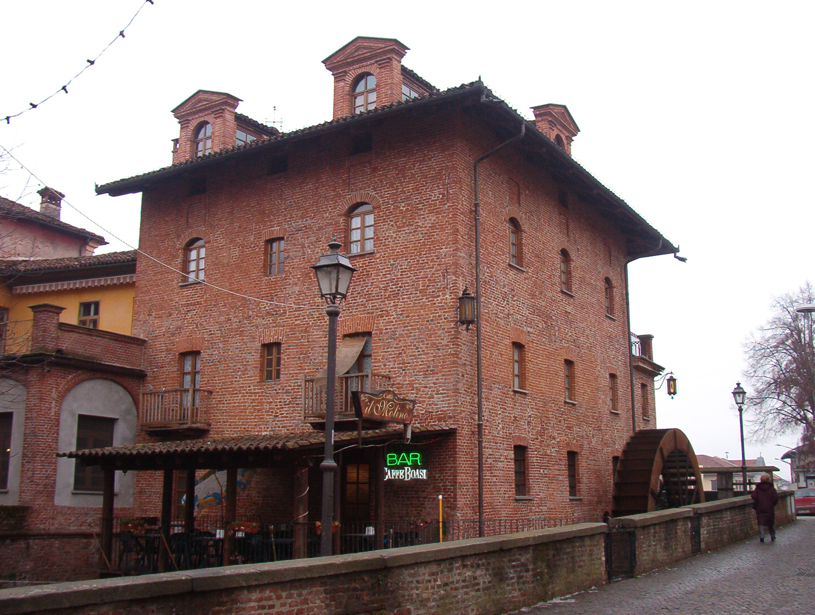 Antico Mulino - Pancalieri - Provincia di Torino - Italy